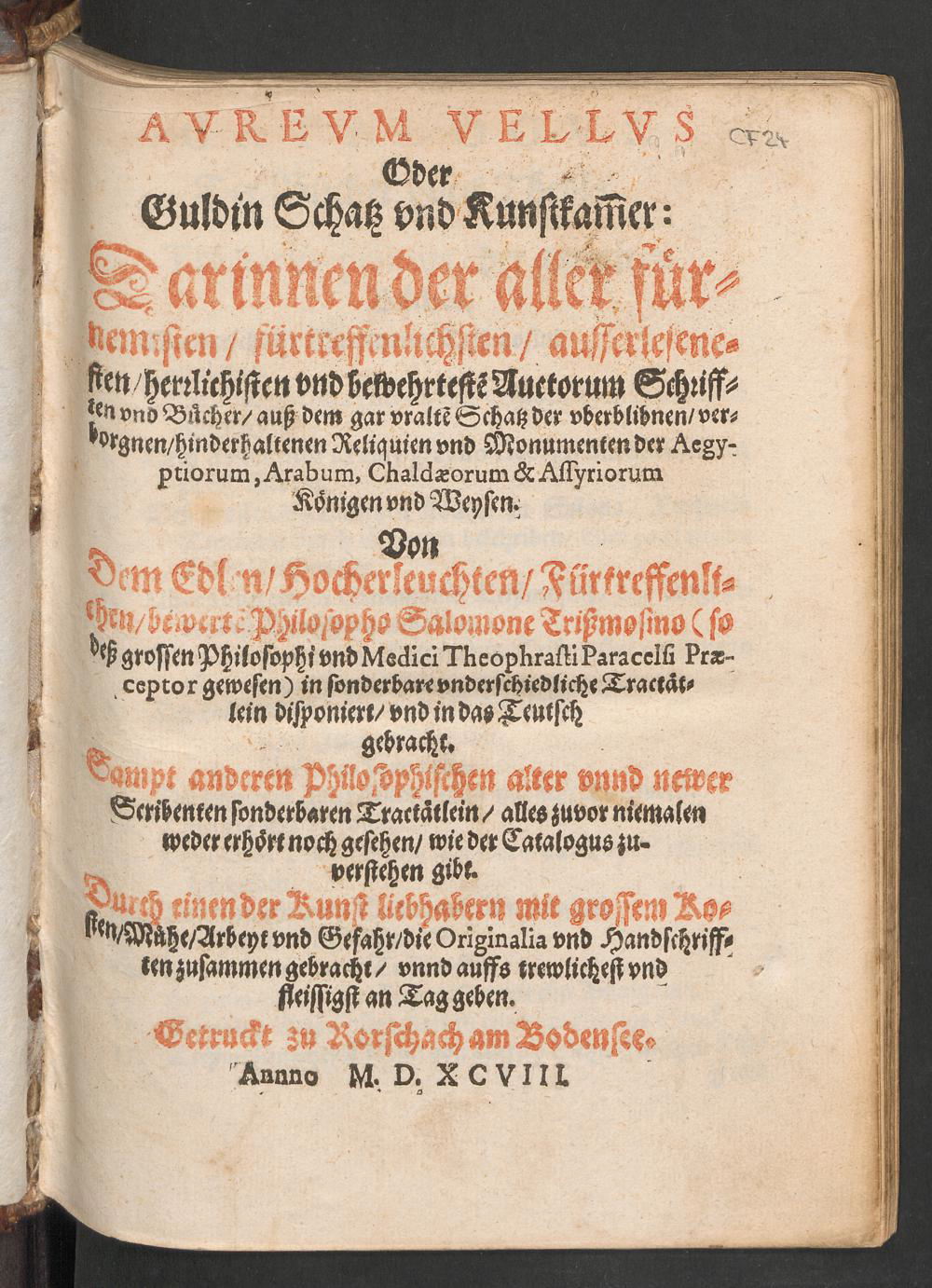 Titelblad